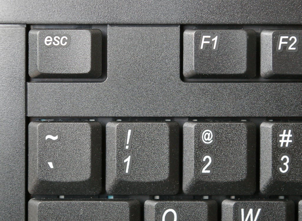 ESC-Taste auf einer PC-Tastatur (US-Layout)